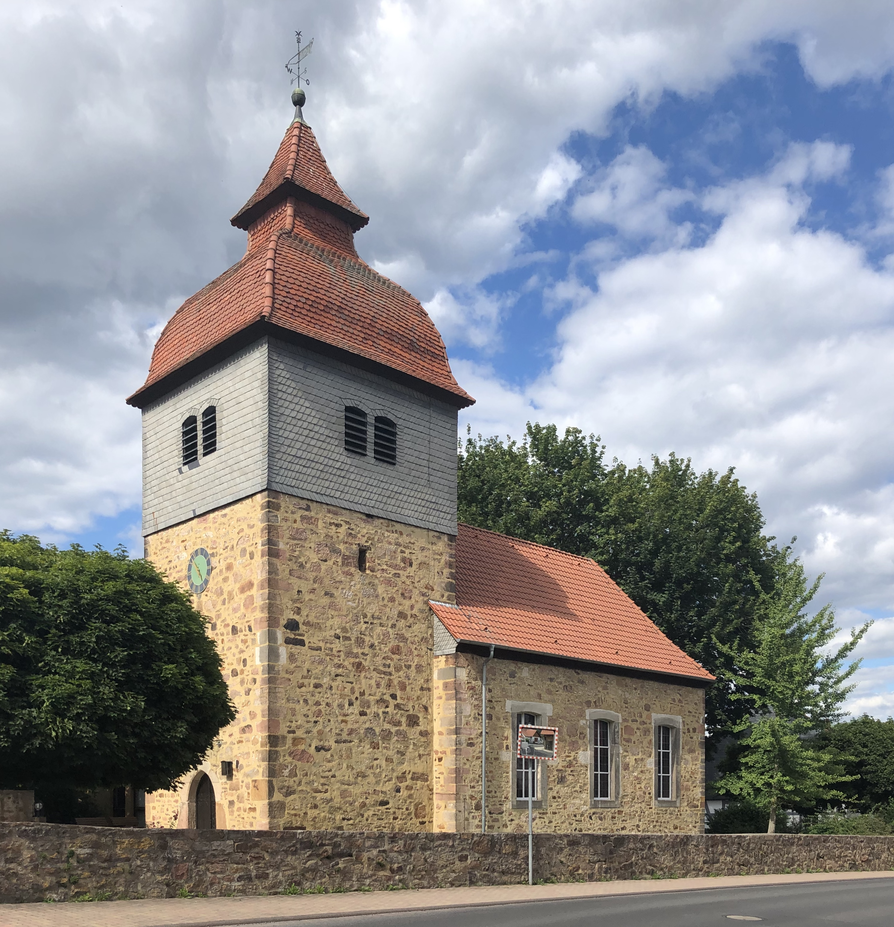 Kirchengebäude